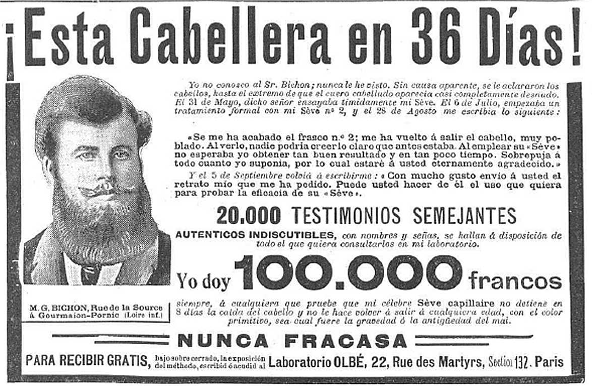 Laboratorio Olbé, 22, Rue des Martyrs, Section 132 Paris - inserzione pubblicitaria del 6.3.1918 su El Mundo Grafico di Barcellona Spagna